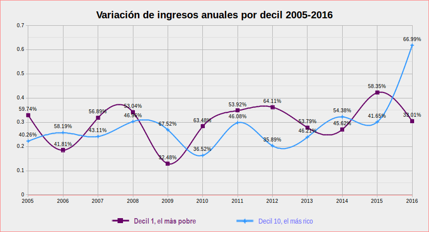 Variación de ingresos anuales por decil (deciles 1 y 10). Argentina. 2005-2016 Fuente: EPH, IndecVariación de los segundos semestres de cada año de los deciles 1 y 10 a partir de la Encuesta Permanente de Hogares del INDEC según escala de ingreso individual